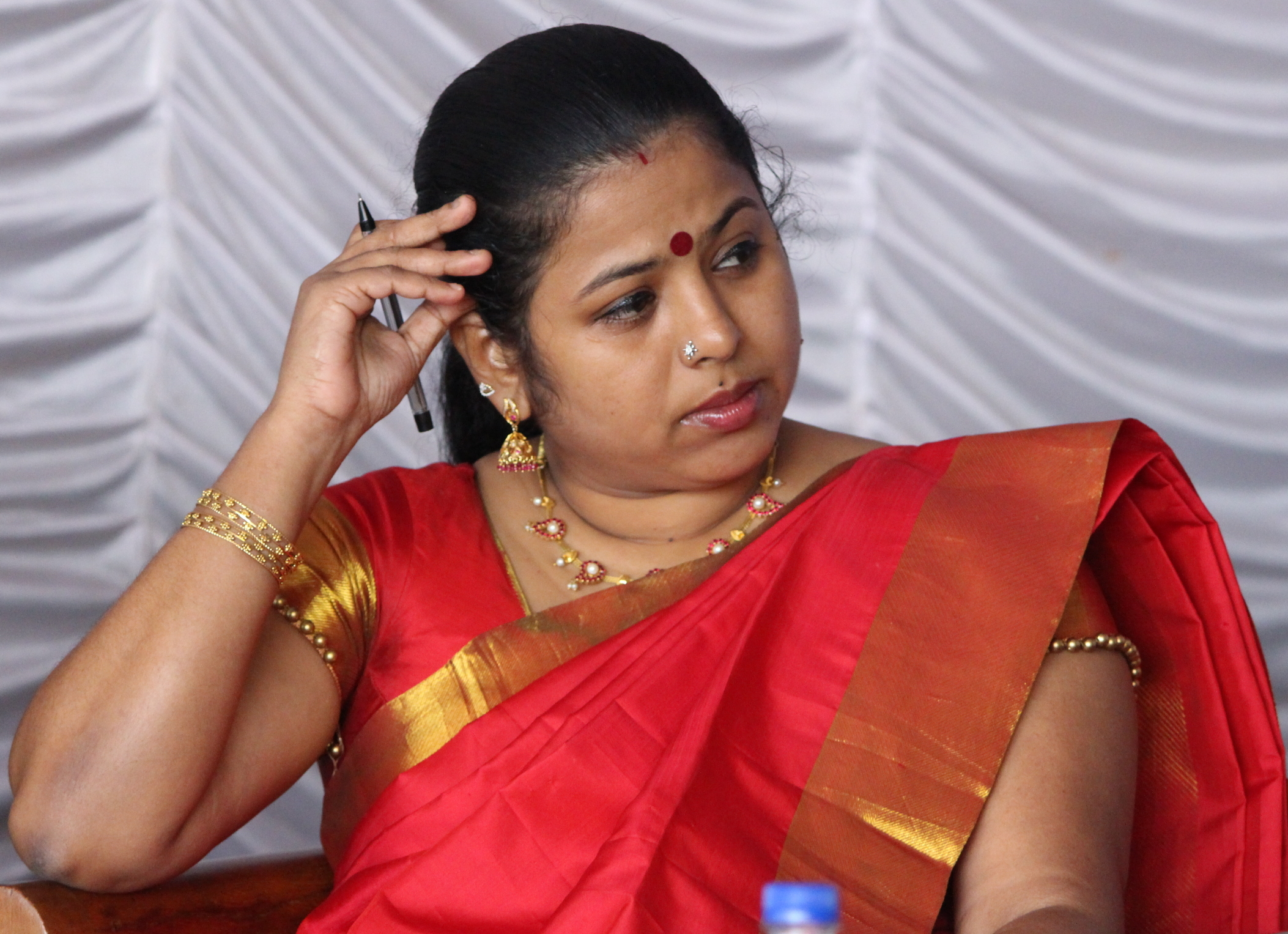 ഇന്ദുമേനോന്‍ കേരള ലിറ്ററേച്ചര്‍ ഫെസ്റ്റിവലില്‍(2017)